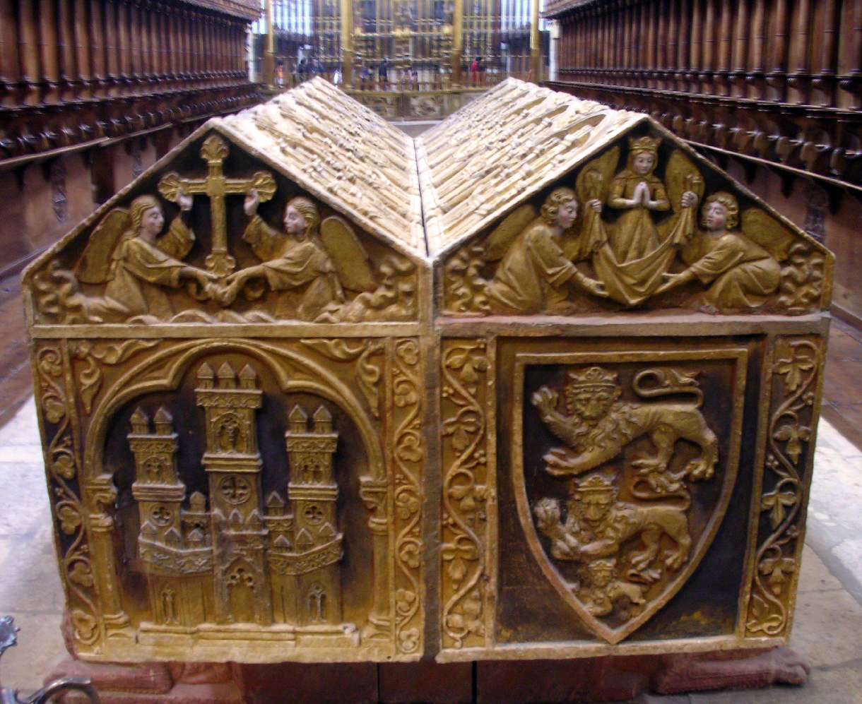 Sepulcros del rey Alfonso VIII de Castilla (1155-1214) y de su esposa, la reina Leonor de Plantagenet (1160-1214). (Monasterio de las Huelgas de Burgos).